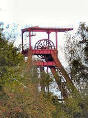 Puit n°7 Monthibert